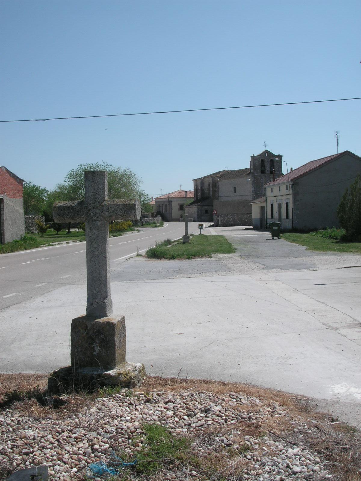 Vista de Vegafría, Segovia, Spain